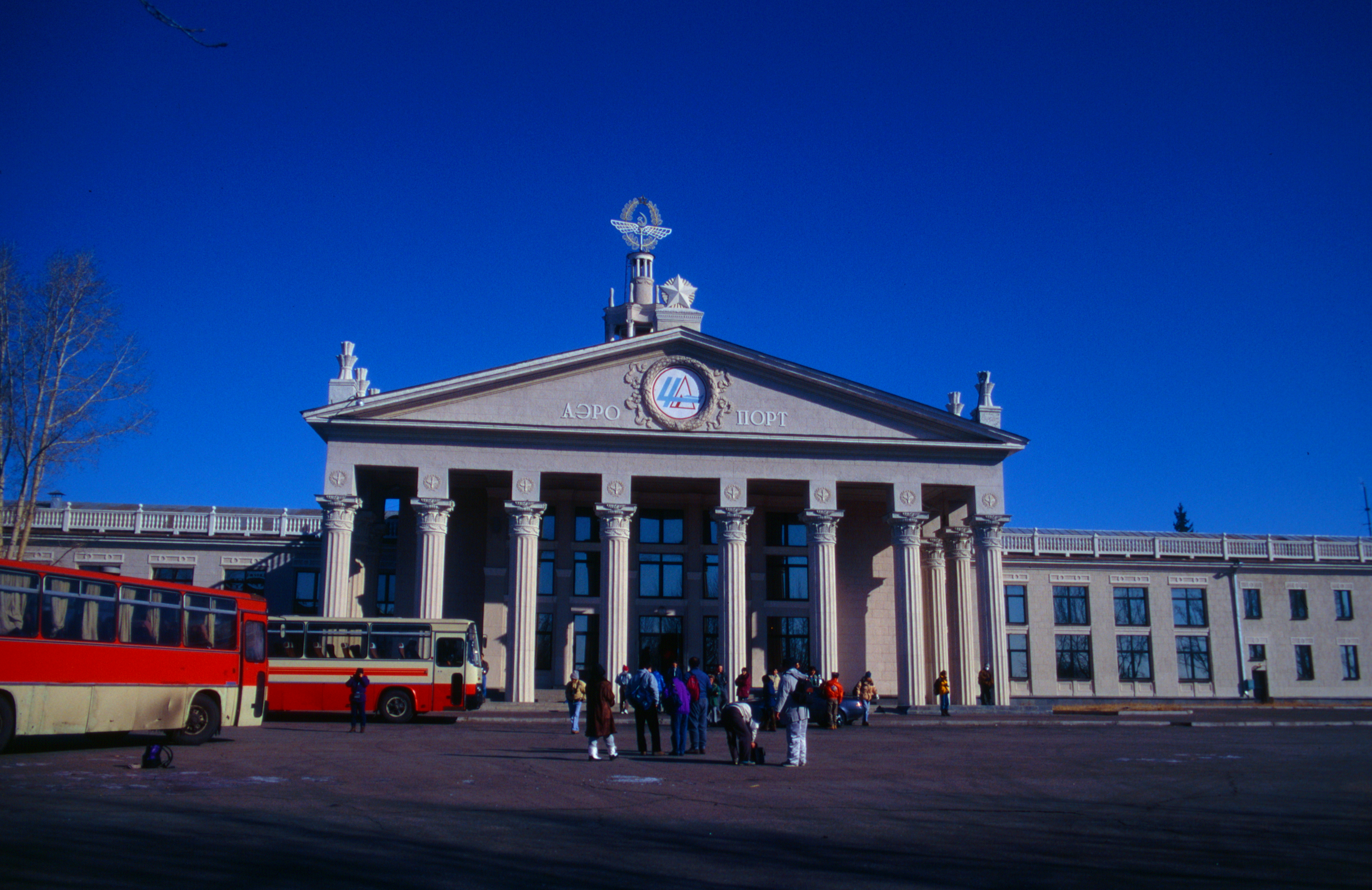 ロシア チタ・カダラ空港の正面